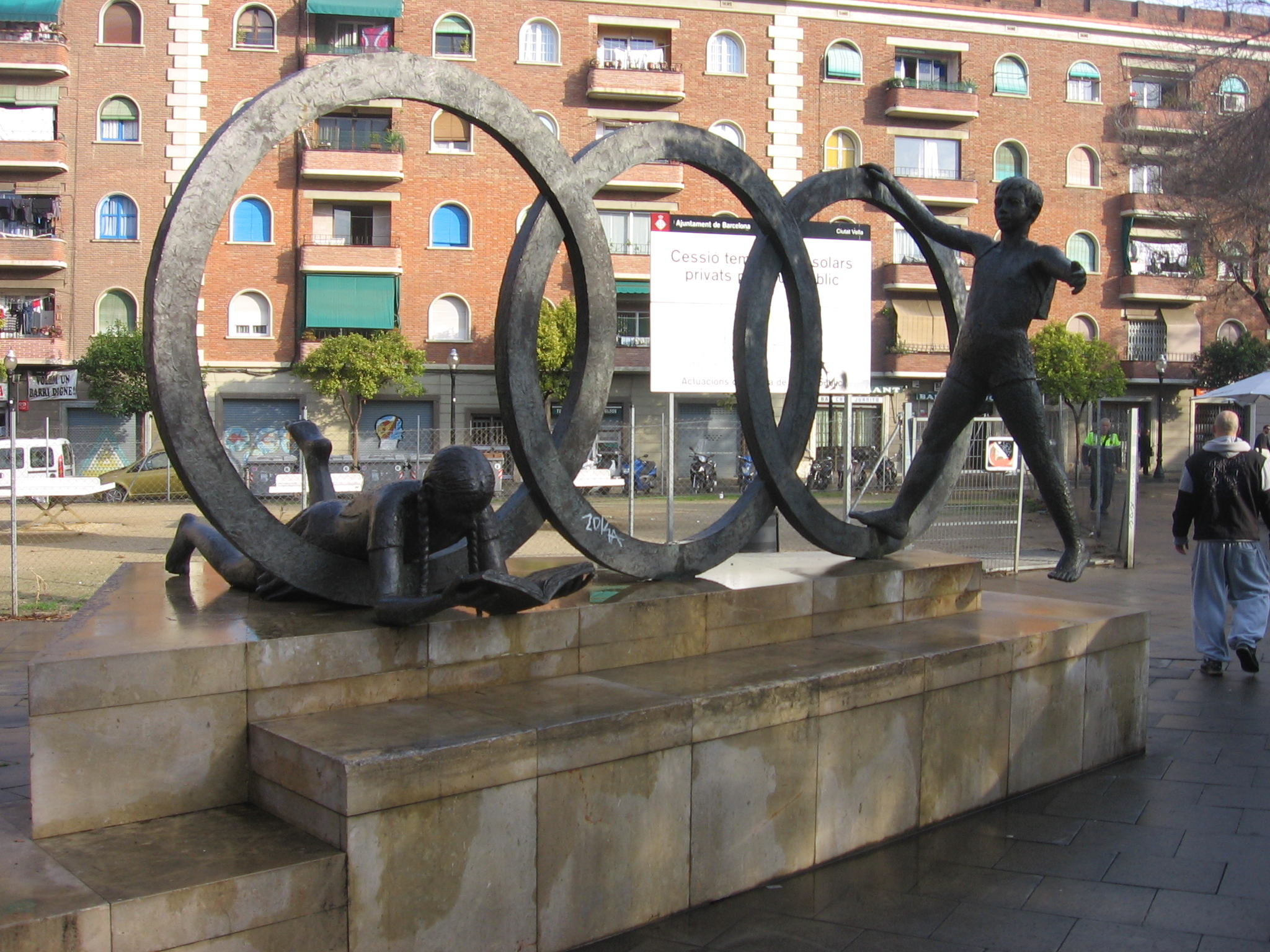 Homenaje a la Mutua Escolar Blanquerna (1998), de Núria Tortras, Plaza Blanquerna.